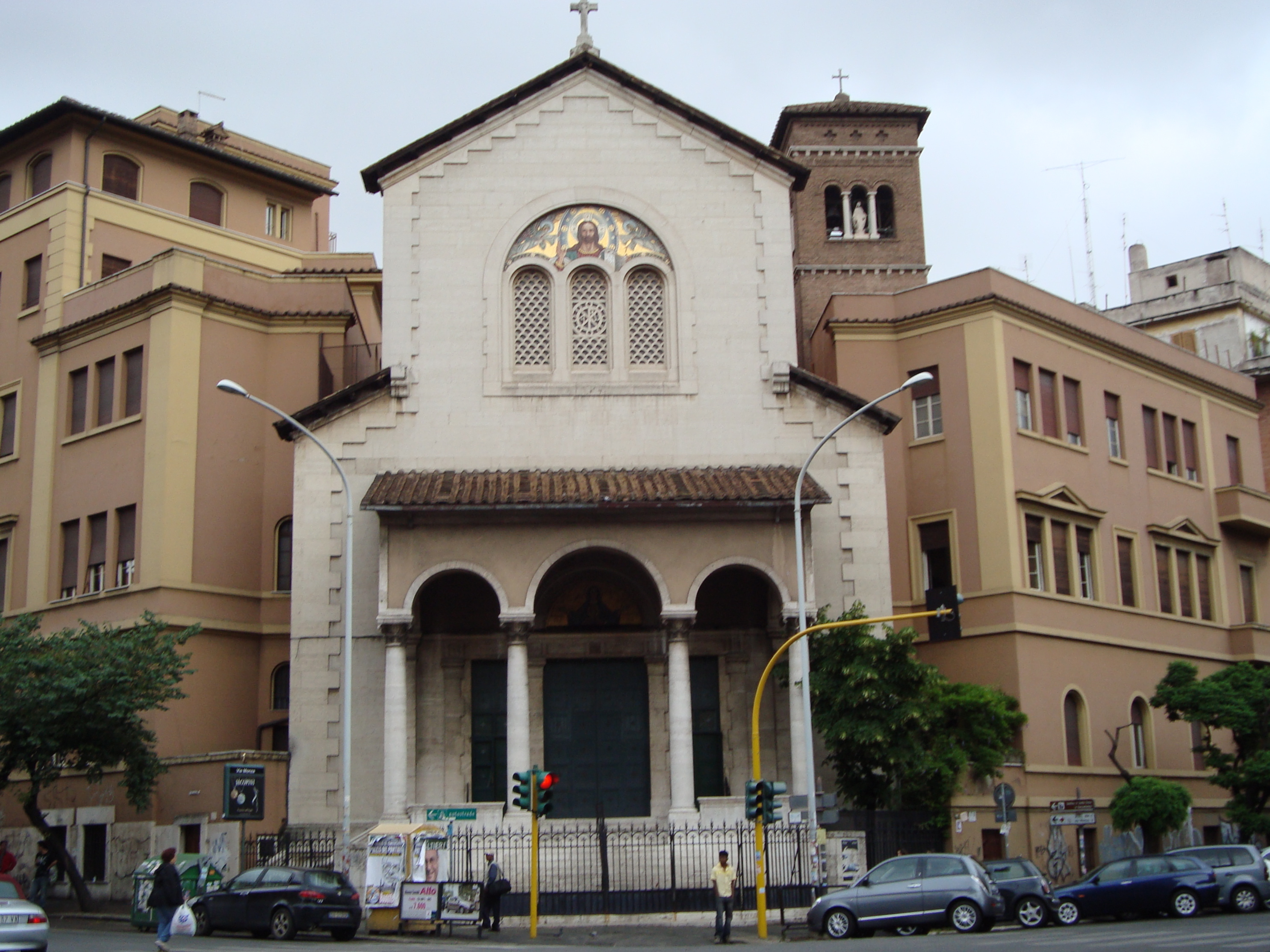 Eglise Santa Maria Immacolata e San Giuseppe Benedetto Labre dans le quartier Tuscolano de Rome